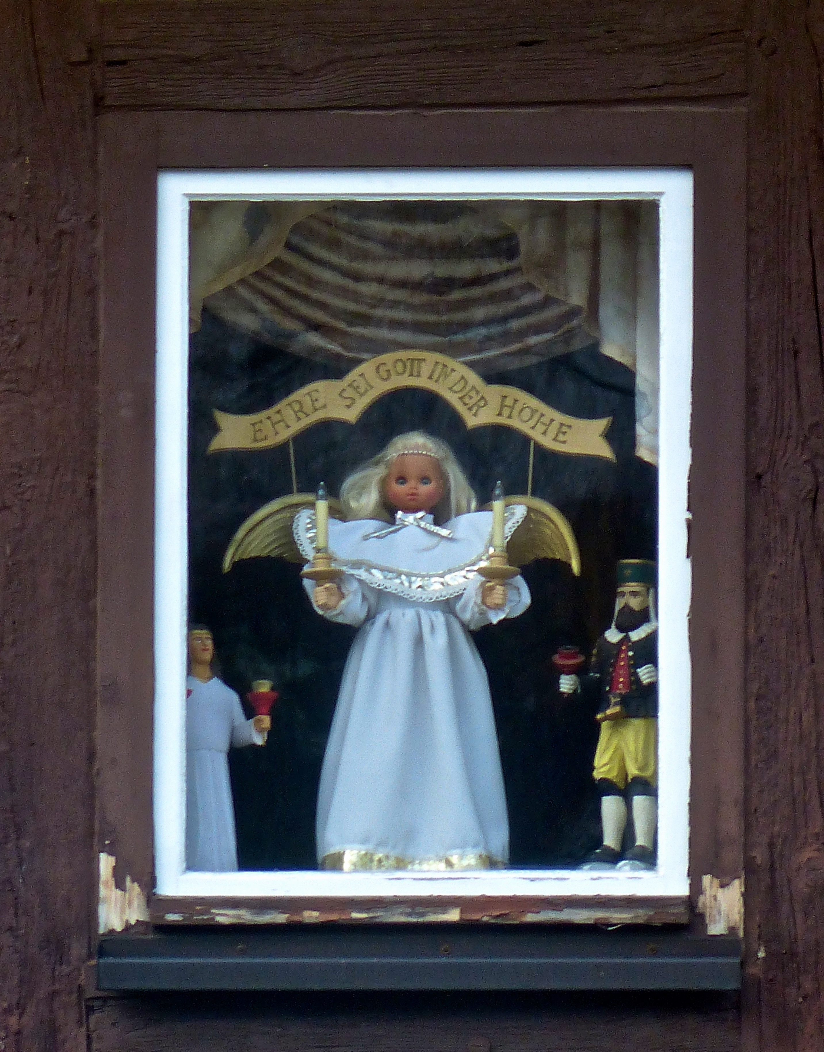 Weihnachtsdekoration in Pobershau: Fensterengel